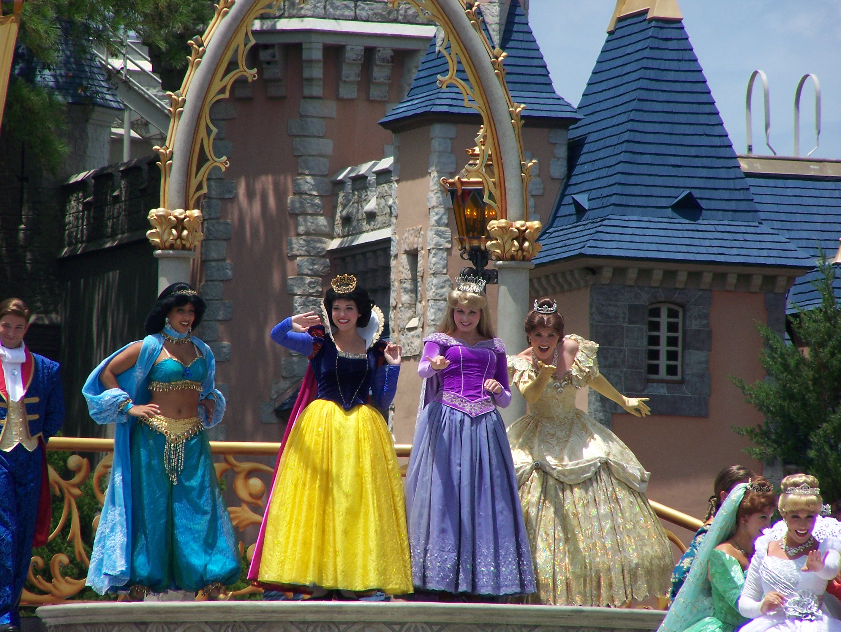 Magic Kingdom